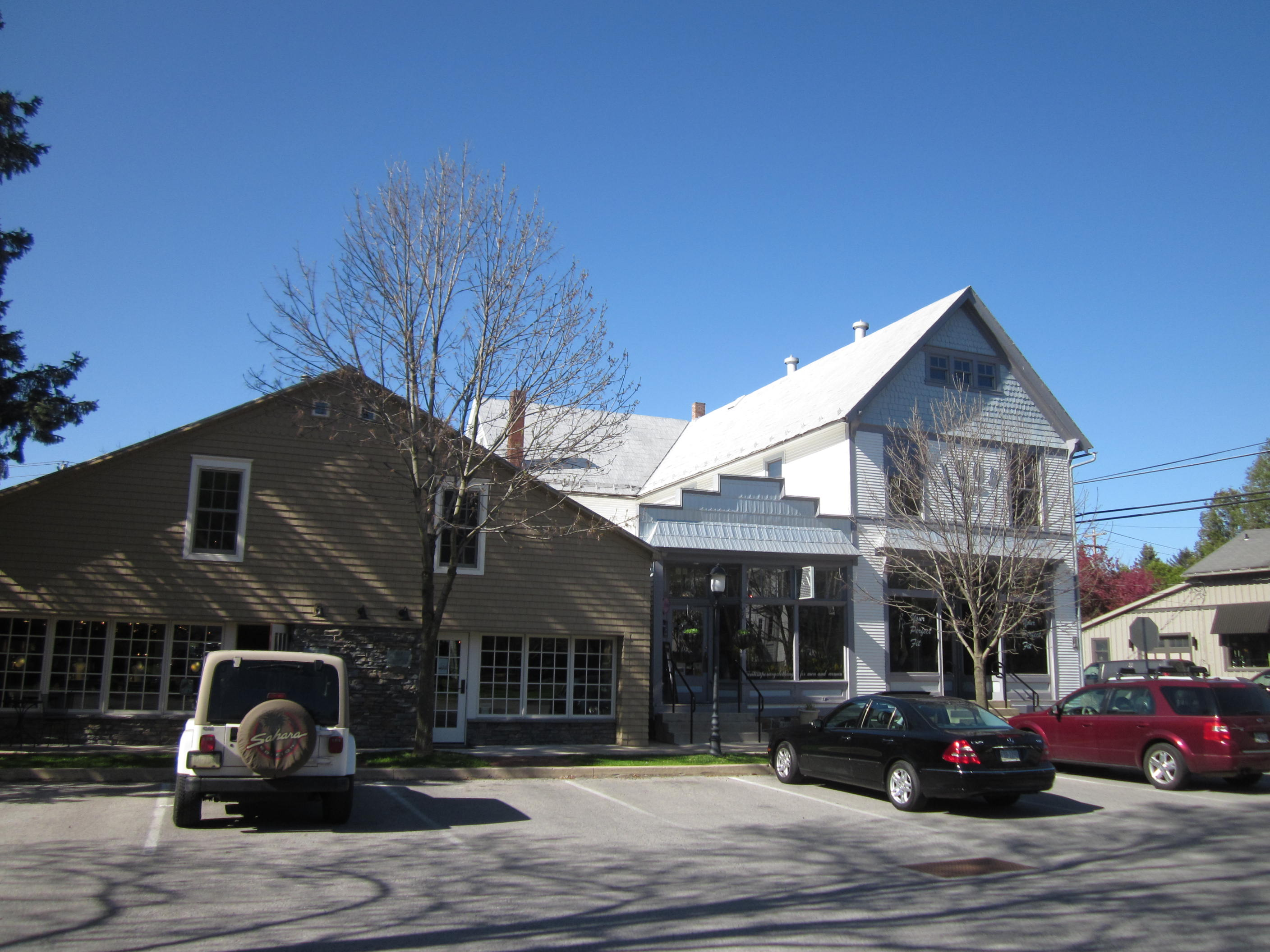 Boalsburg, Pennsylvania